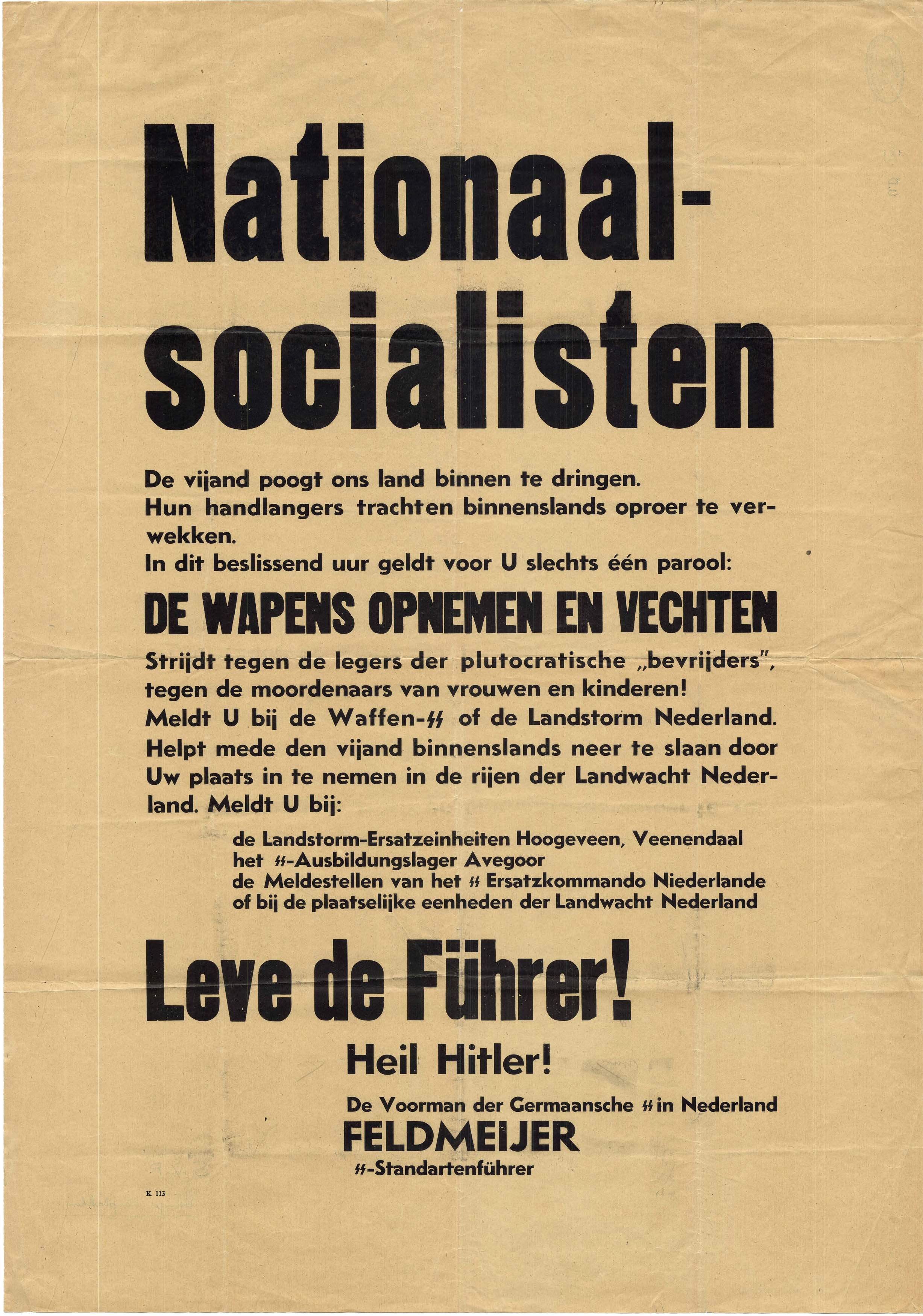 Wervingsaffiche Landstorm Nederland (from